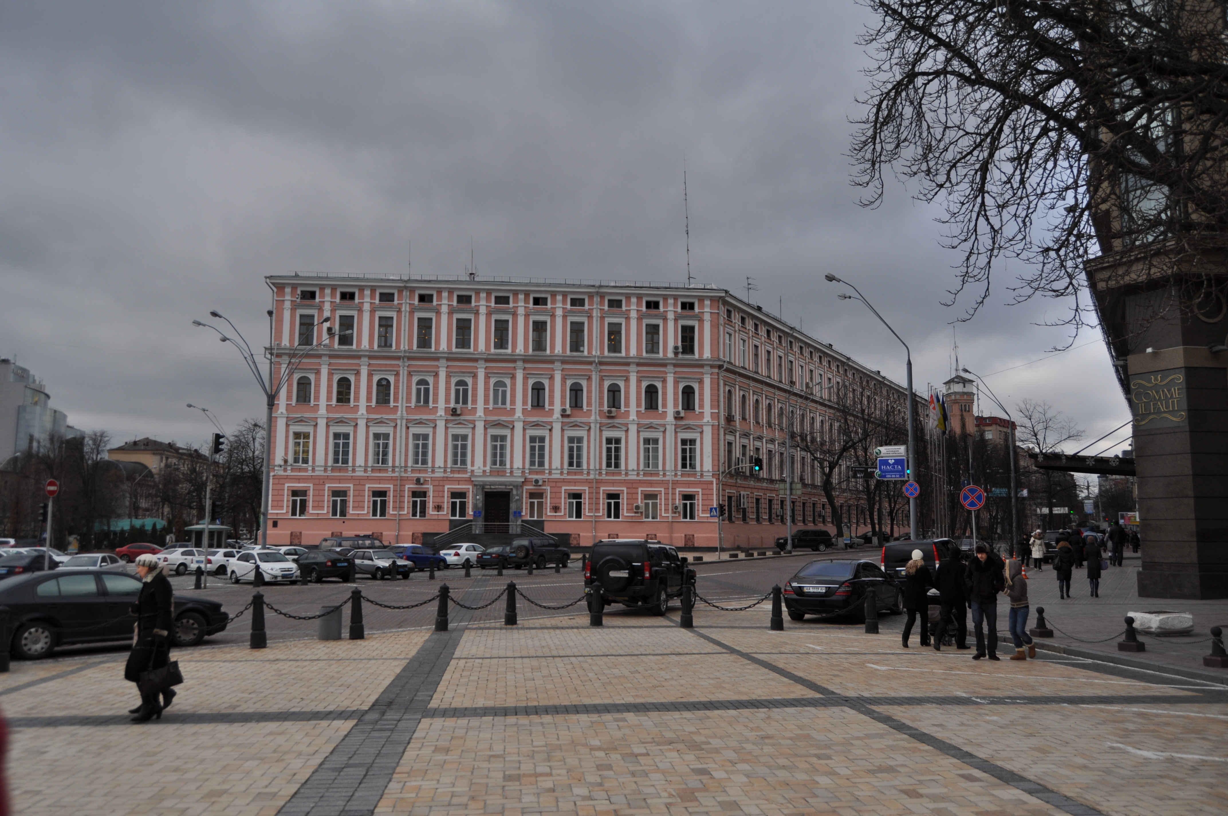 Будинок Присутствених місць з будинком міської поліції, Київ, Велика Житомирська вул., 1-3/15